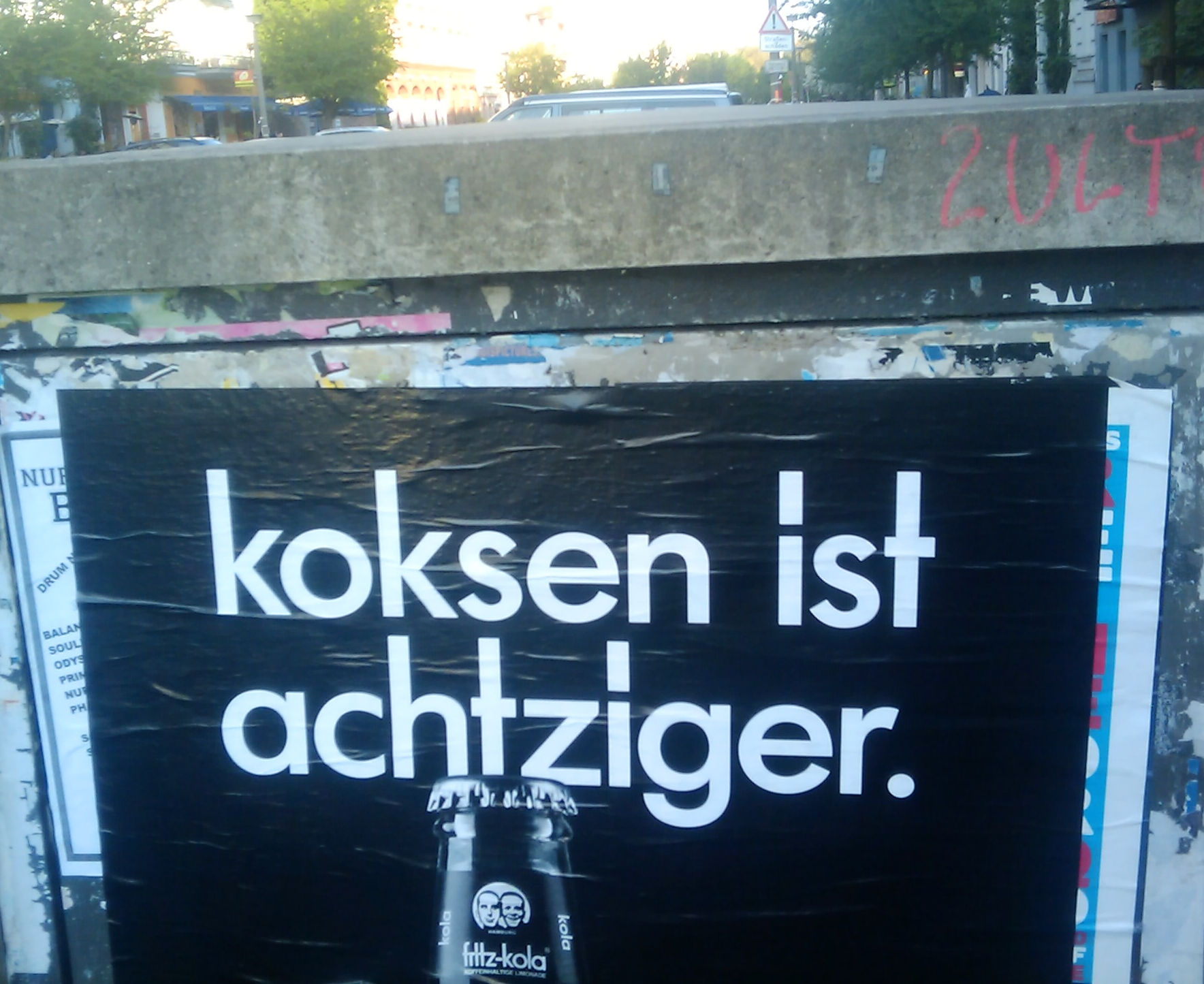 Plakatwerbung für fritz-kola, hier mit dem Slogan „koksen ist achtziger.“